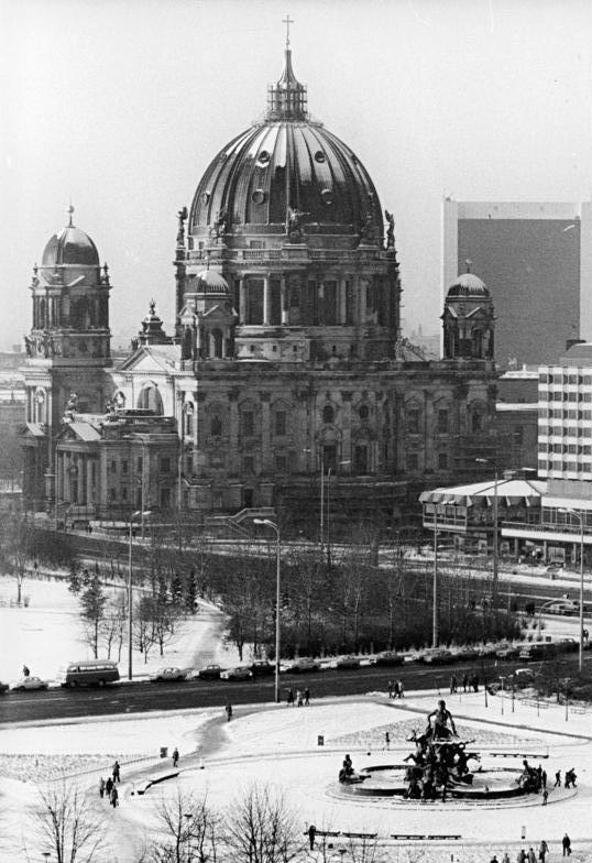 Berlin, Dom, Neptunbrunnen, Winter Zum Beitrag: Der Dom - ein Stück Berlin-Gedanken um die Neuerstehung des beeindruckenden Monumentalbaus ADN-ZB Settnik-13.1.1982-bb-Blick aus der Richtung Rathauspassagen auf den Berliner Dom. Im Vordergrund der Neptunbrunnen. (Bitte beachten Sie hierzu auch 1982-0113-301N-303N!)